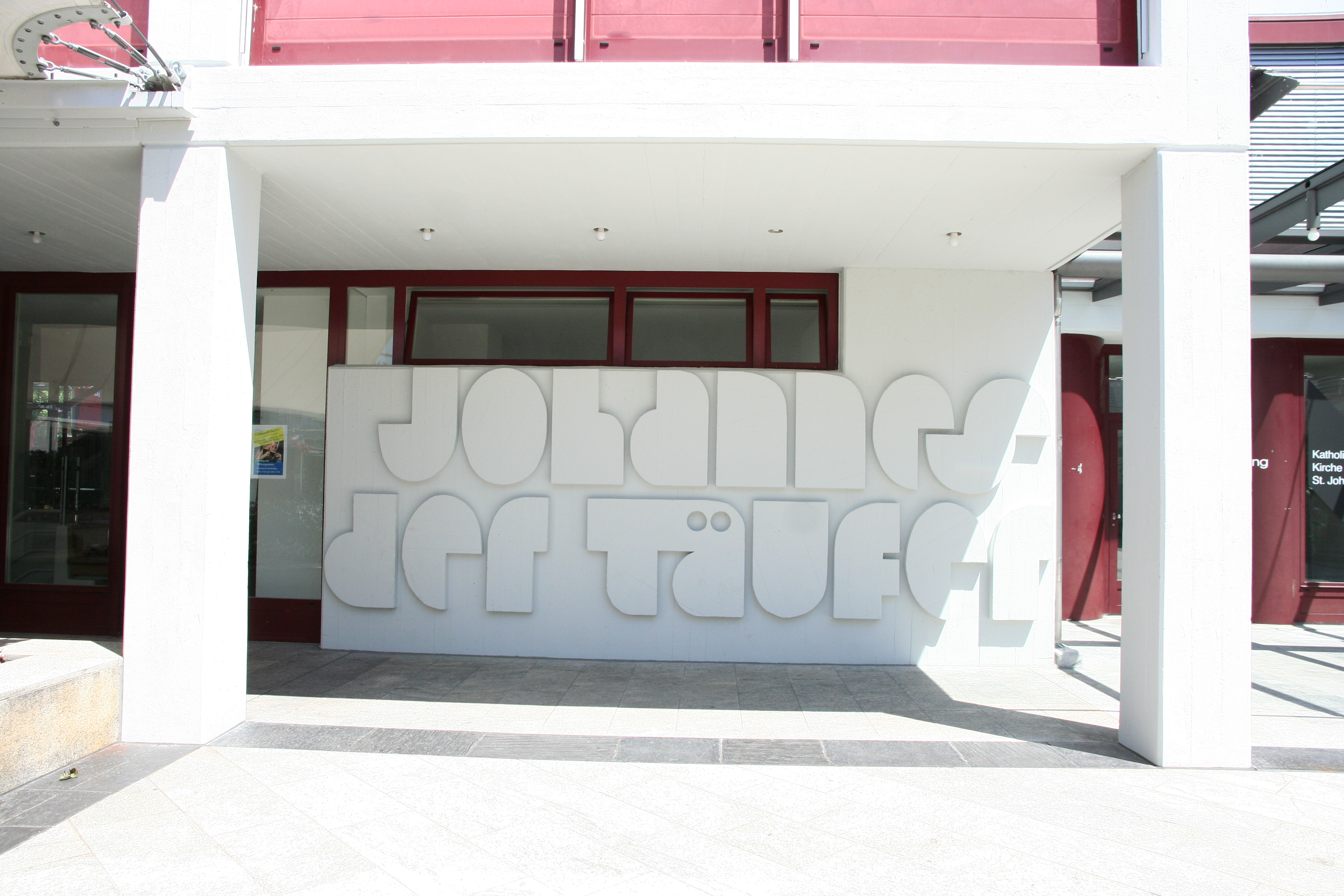 Römisch-katholische Pfarrkirche St. Johannes der Täufer Geroldswil, Aussenrelief